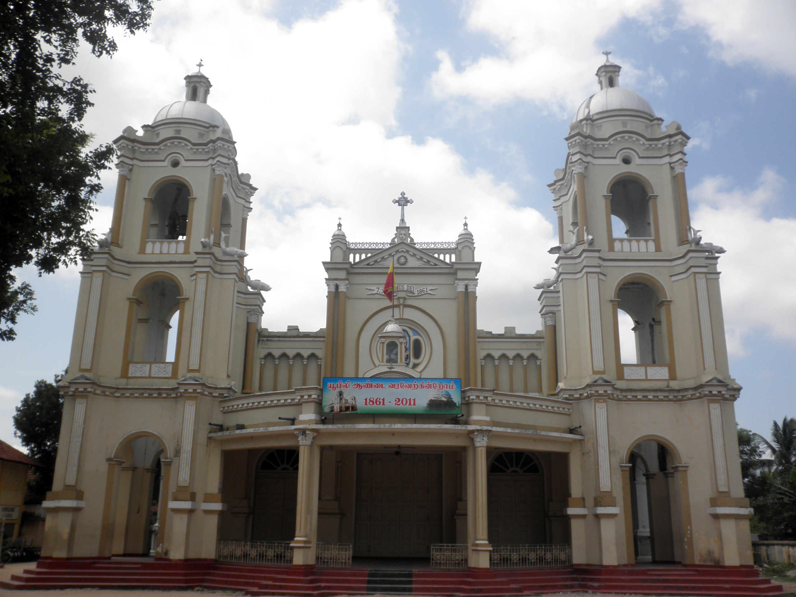 St. James' church, Jaffna